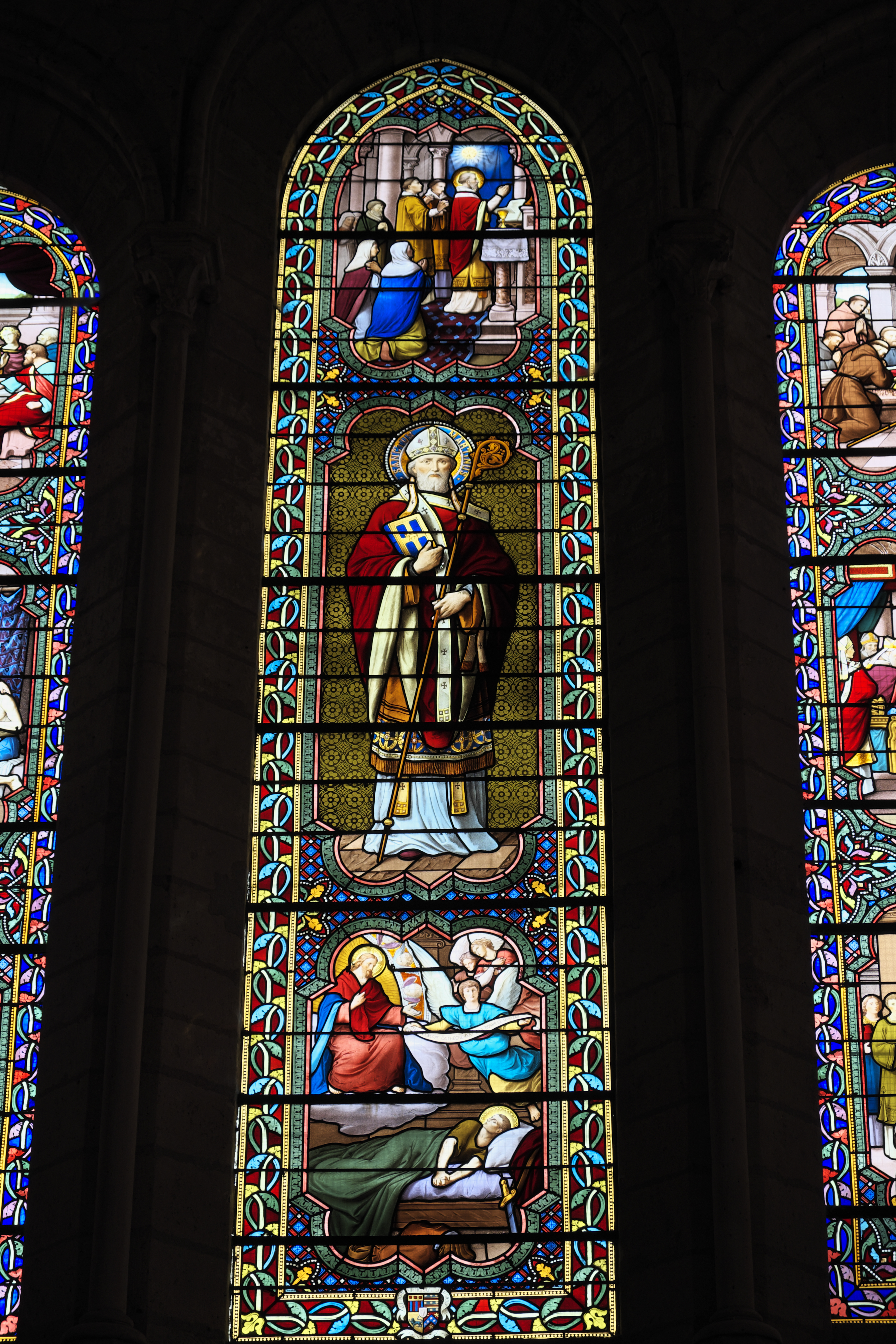 Katholische Pfarrkirche Saint-Martin in Sucy-en-Brie im Département Val-de-Marne (Île-de-France/Frankreich), Bleiglasfenster